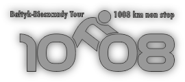 Logo BBT